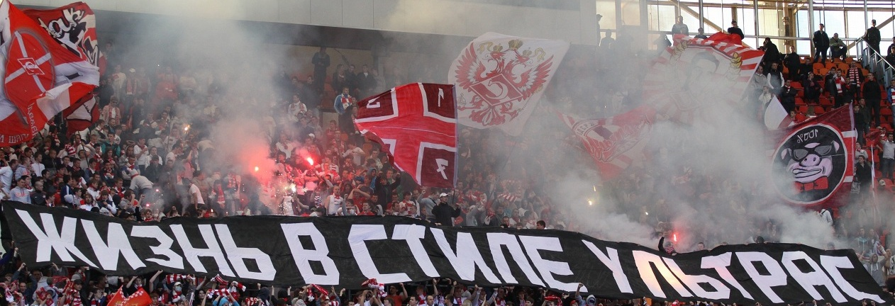 Перфоманс "Жизнь в стиле ультрас" на матче с "Динамо". 2012 год